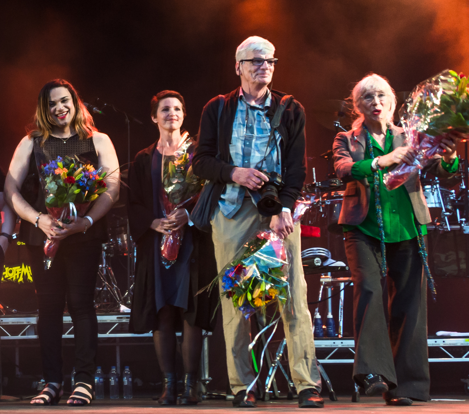 Lars Epstein tar emot Stockholms stads kulturpris/Lennart af Petersens pris på Gustav Adolfs torg den 18 augusti 2017. Övriga kulturpristagare: Suzanne Osten, Kristina Sandberg.